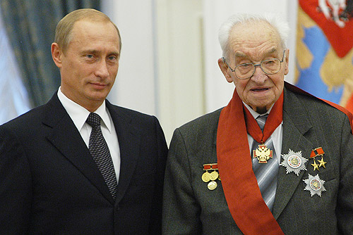 Владимир Котельников награждён Орденом "За заслуги перед Отечеством" I степени